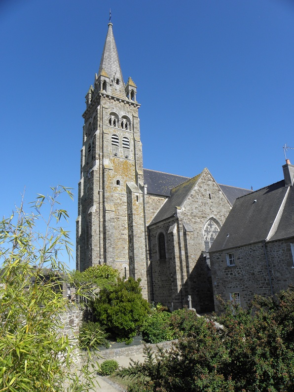 Église Saint-Pierre à Saint-Père-Marc-en-Poulet (35).